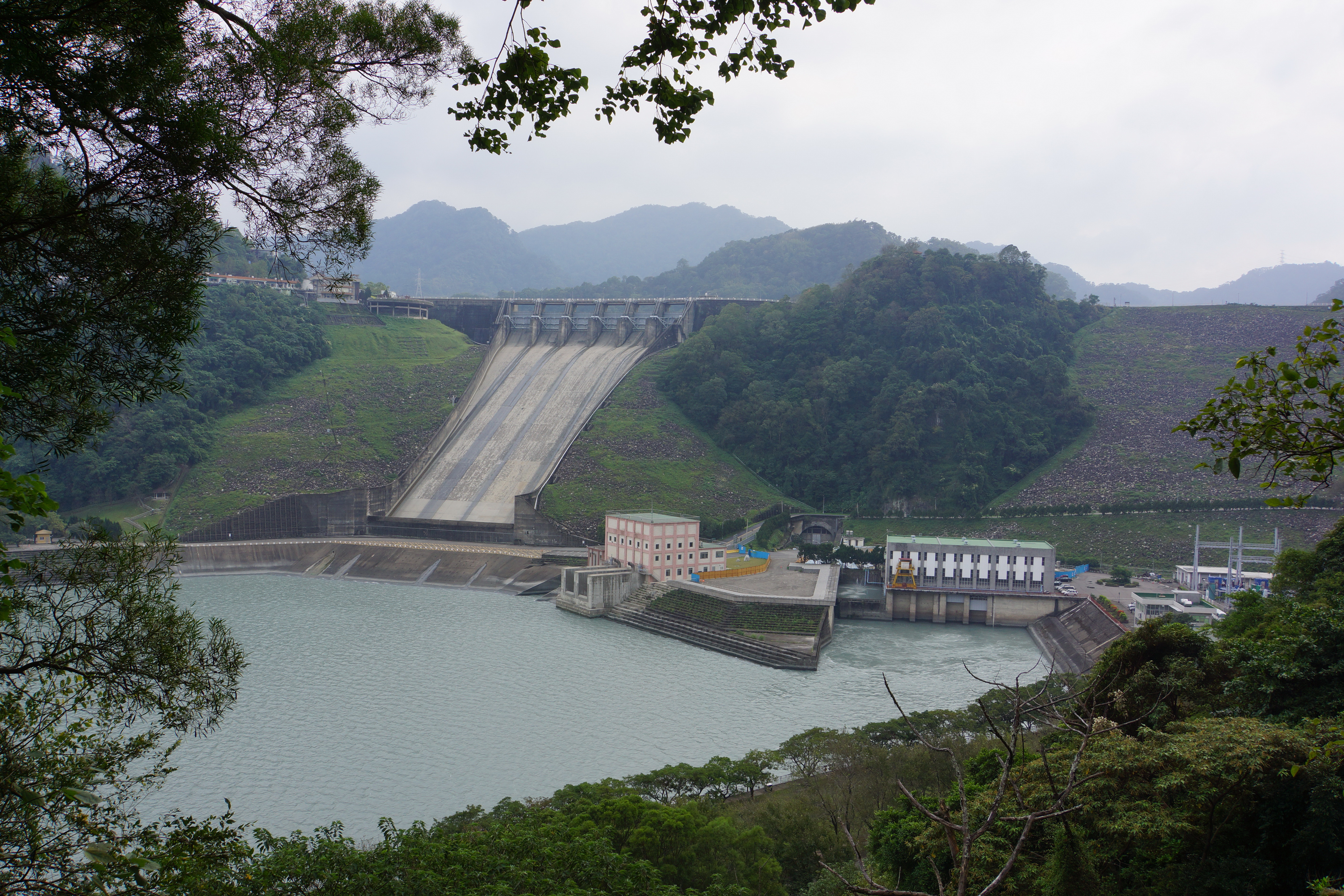 Shimen Reservoir Dam 石門水庫大壩